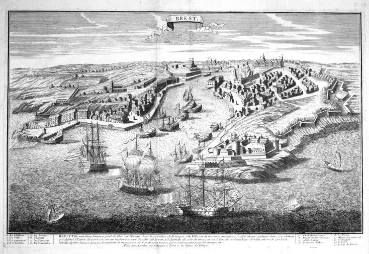 Vue cavalière du port de Brest entre les travaux de Vauban et ceux de Choquet de Lindu, fin 17e siècle - début 18e siècle